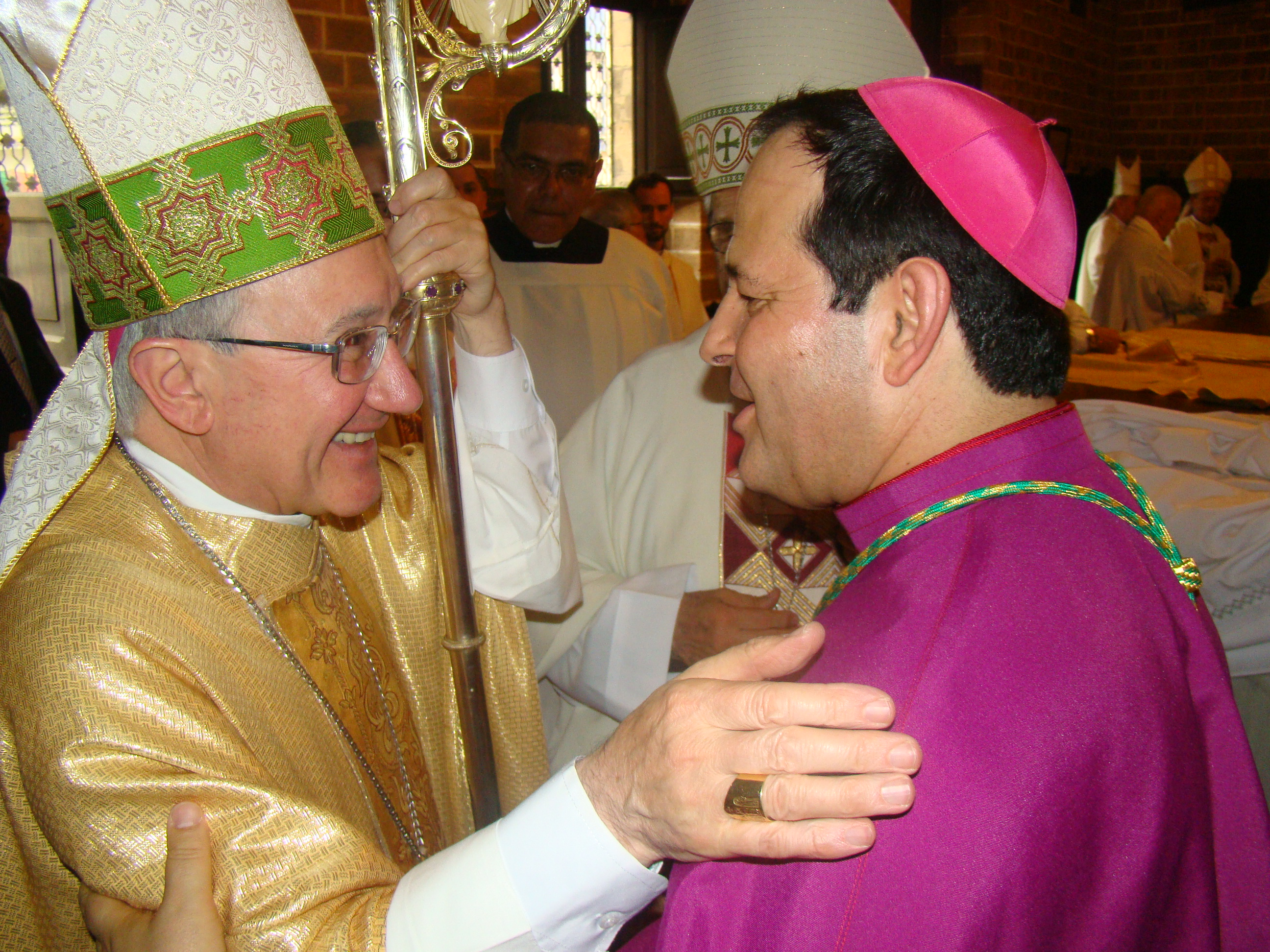 Nuncio Apostólico y Arzobispo de Medellín